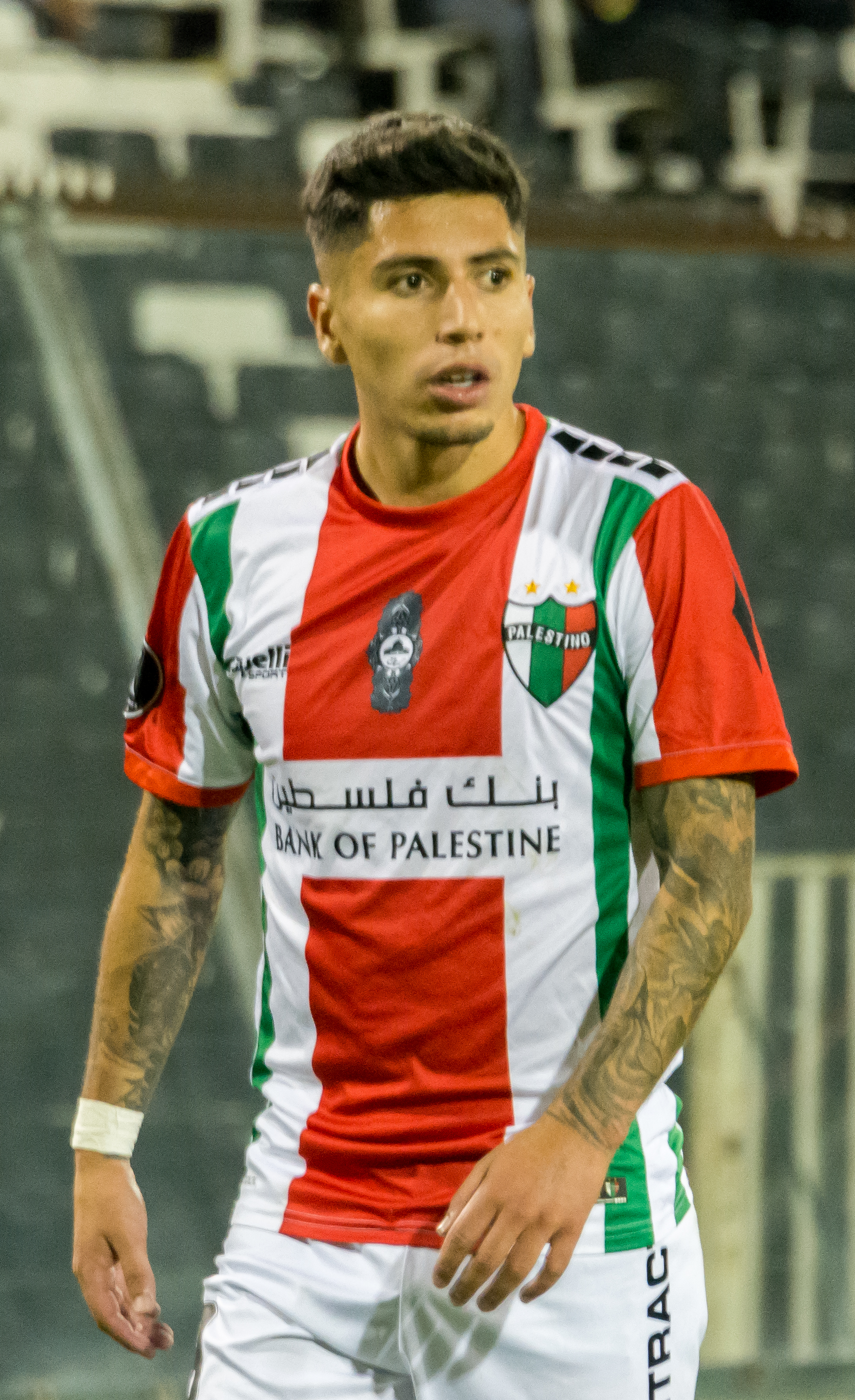 Brayan Véjar, Palestino vs Alianza Lima, Estadio Monumental, Macul, Santiago, Chile.